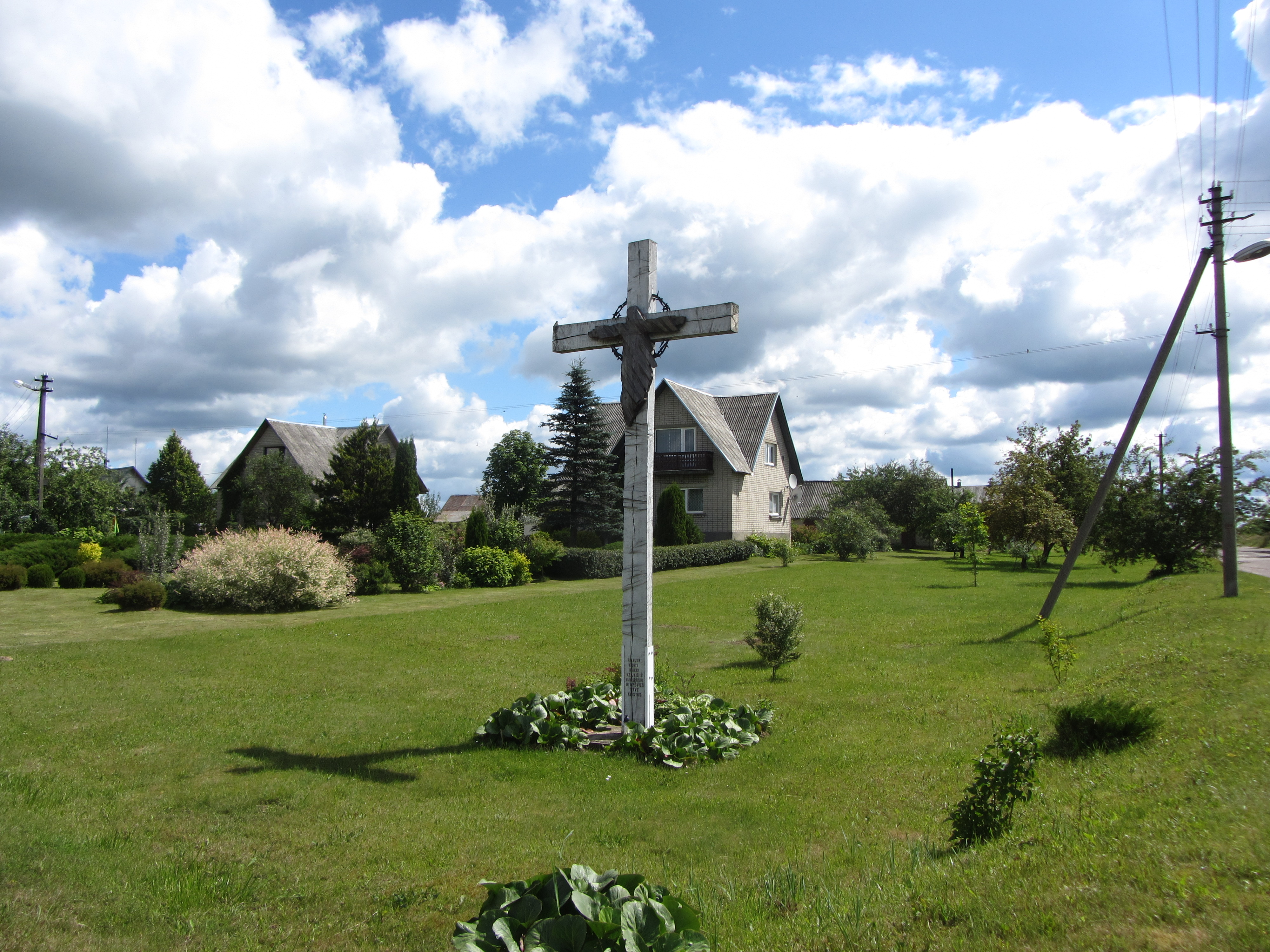 Vidutinė, Lithuania